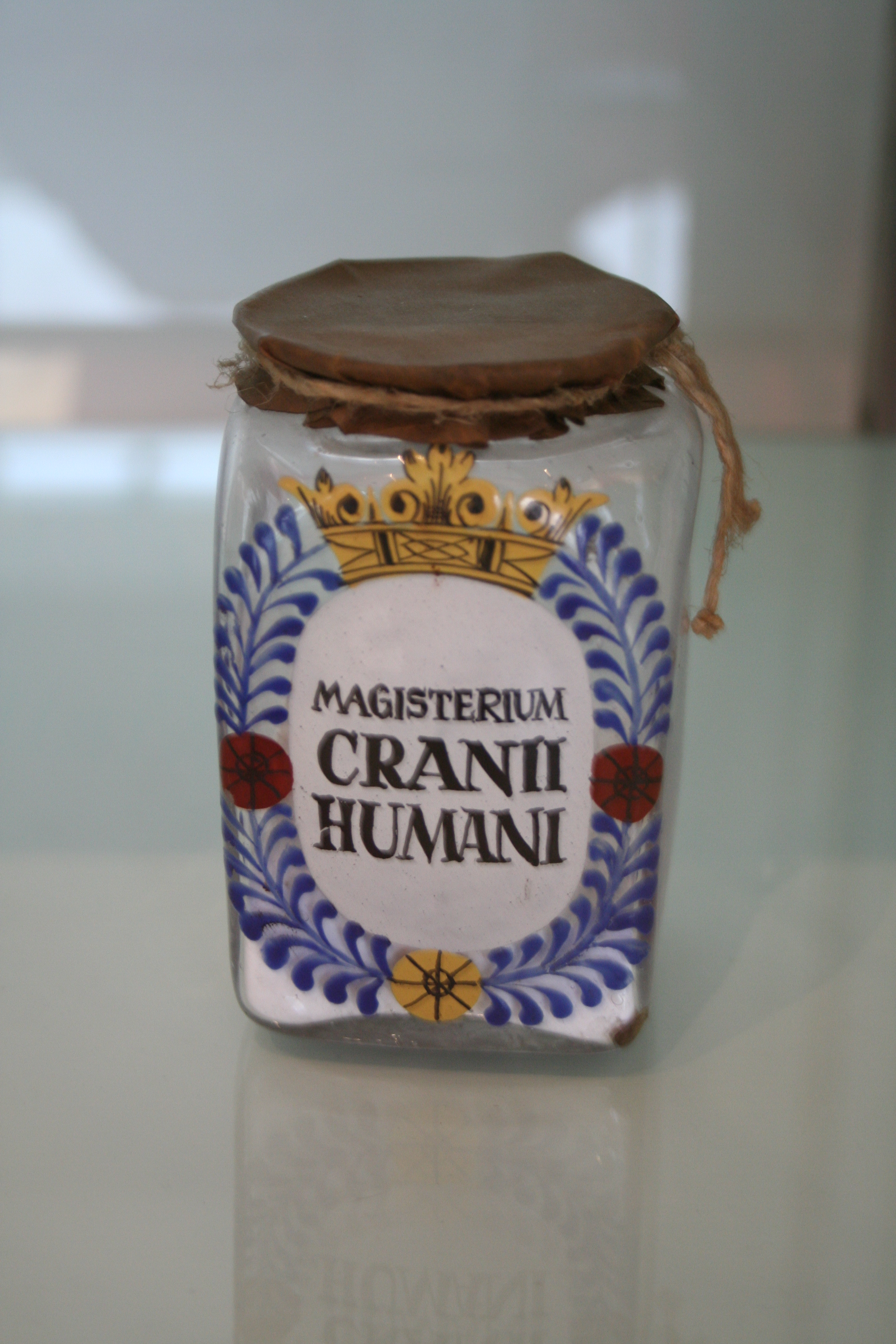 Apothekergefäß (Albarello) für Cranium Humanum. Glas, bemalt mit Deckel aus gewachstem Papier und Bindfaden. Aufschrift: "MAGISTERIUM CRANII HUMANI". Museum für Sepulkralkultur, Kassel